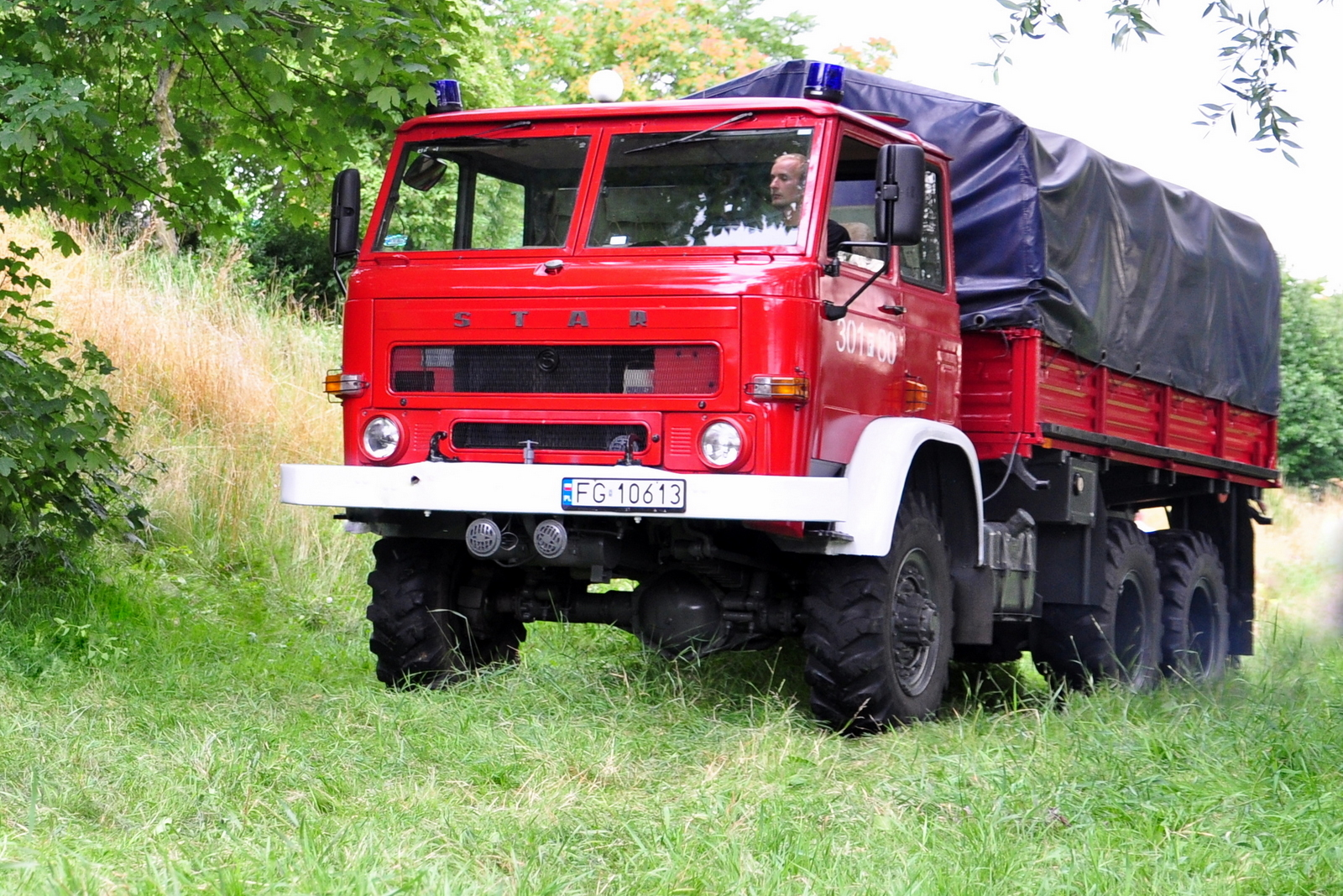 Samochód pożarniczy Star 266, wężowy ( SW 3000 ), nr operacyjny 301[F]80 ( ćwiczenia, łąki nadwarciańskie w Gorzowie Wlkp. )